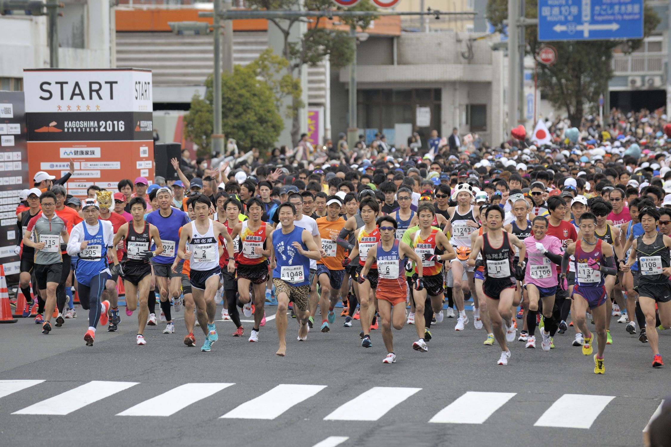 鹿児島マラソンのスタート直後の様子。